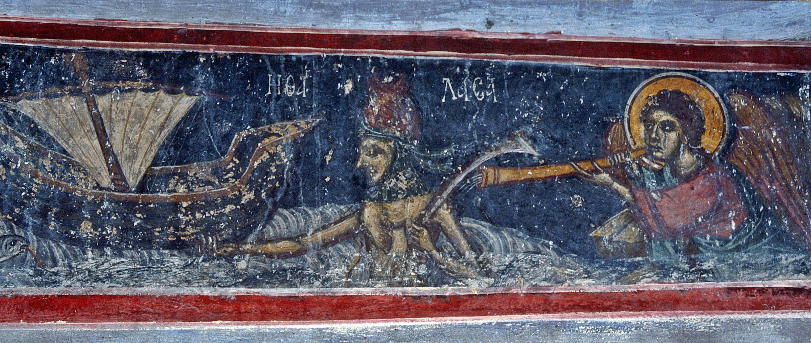 Margarites: Kirche des Heiligen Johannes, Fresken von 1392